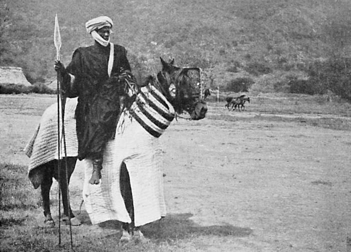 Cavalier arabe du Dékakiré sur un cheval caparaçonné. From L'Afrique Équatoriale Française: le pays, les habitants, la colonisation, les pouvoirs publics. Préf. de M. Merlin. Avec 186 reproductions photographiques, 33 diagrammes, profils, et 7 cartes dont 5 en couleurs, (published 1918).